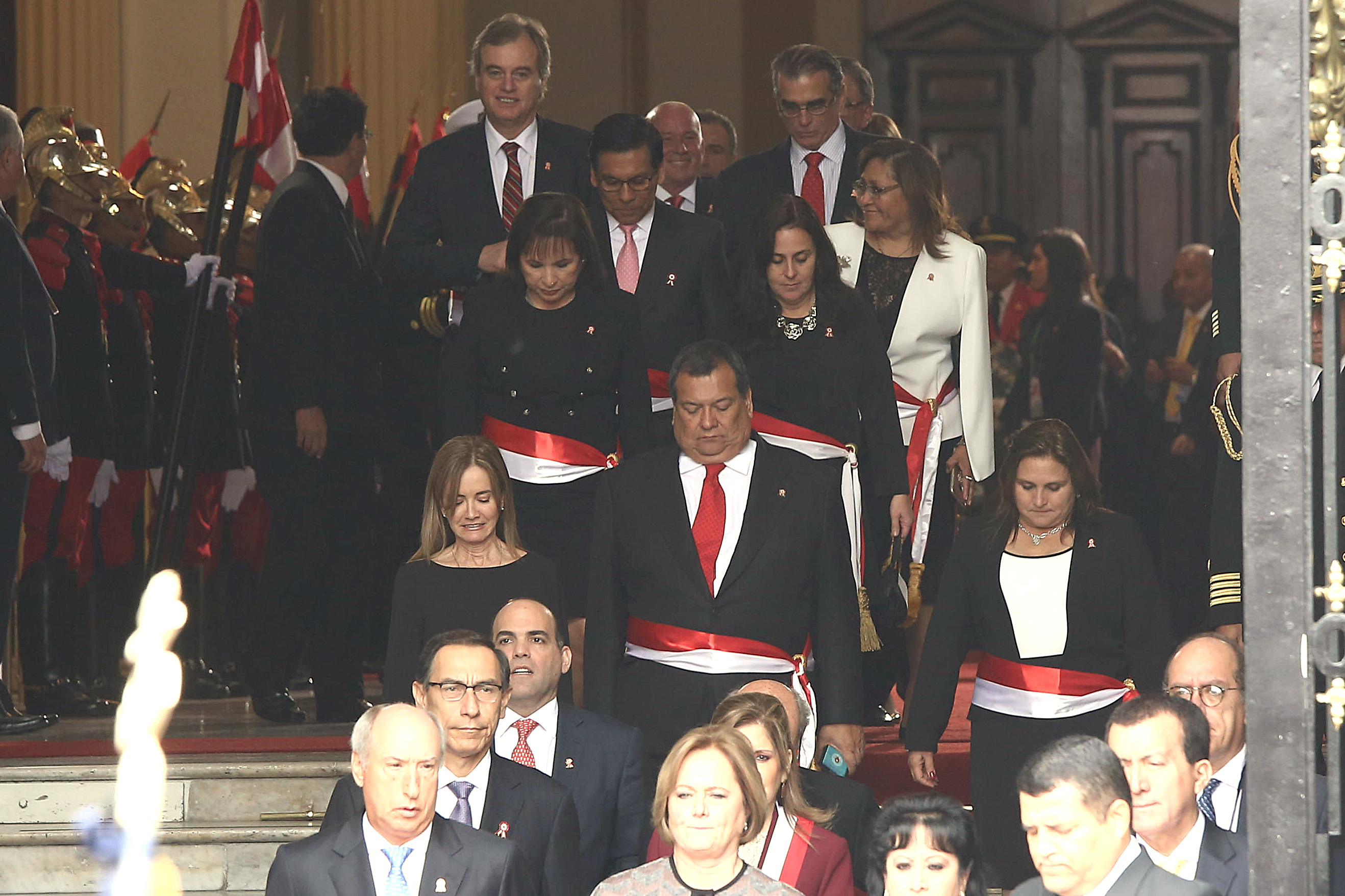 Un merecido y sentido homenaje rindió el presidente de la República, Pedro Pablo Kuczynski, al personal de las Fuerzas Armadas y del Centro de Operaciones de Emergencia Nacional (COEN), que se ubicaron en “primera fila” para atender a la población durante la emergencia causada por el fenómeno climático Niño Costero.